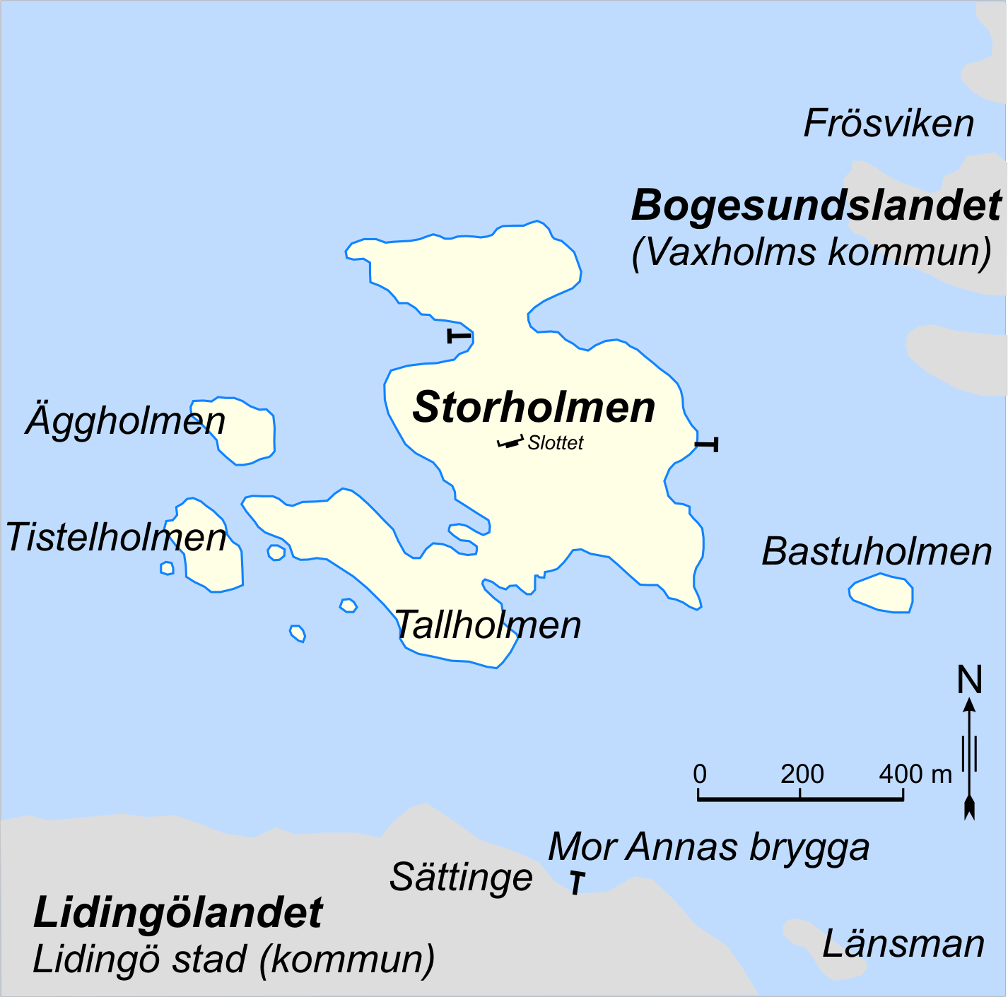 Storholmsöarna norr om Lidingö tillhörande Vaxholms kommun. Övergår till Lidingö stad (kommun) den 1 januari 2011.